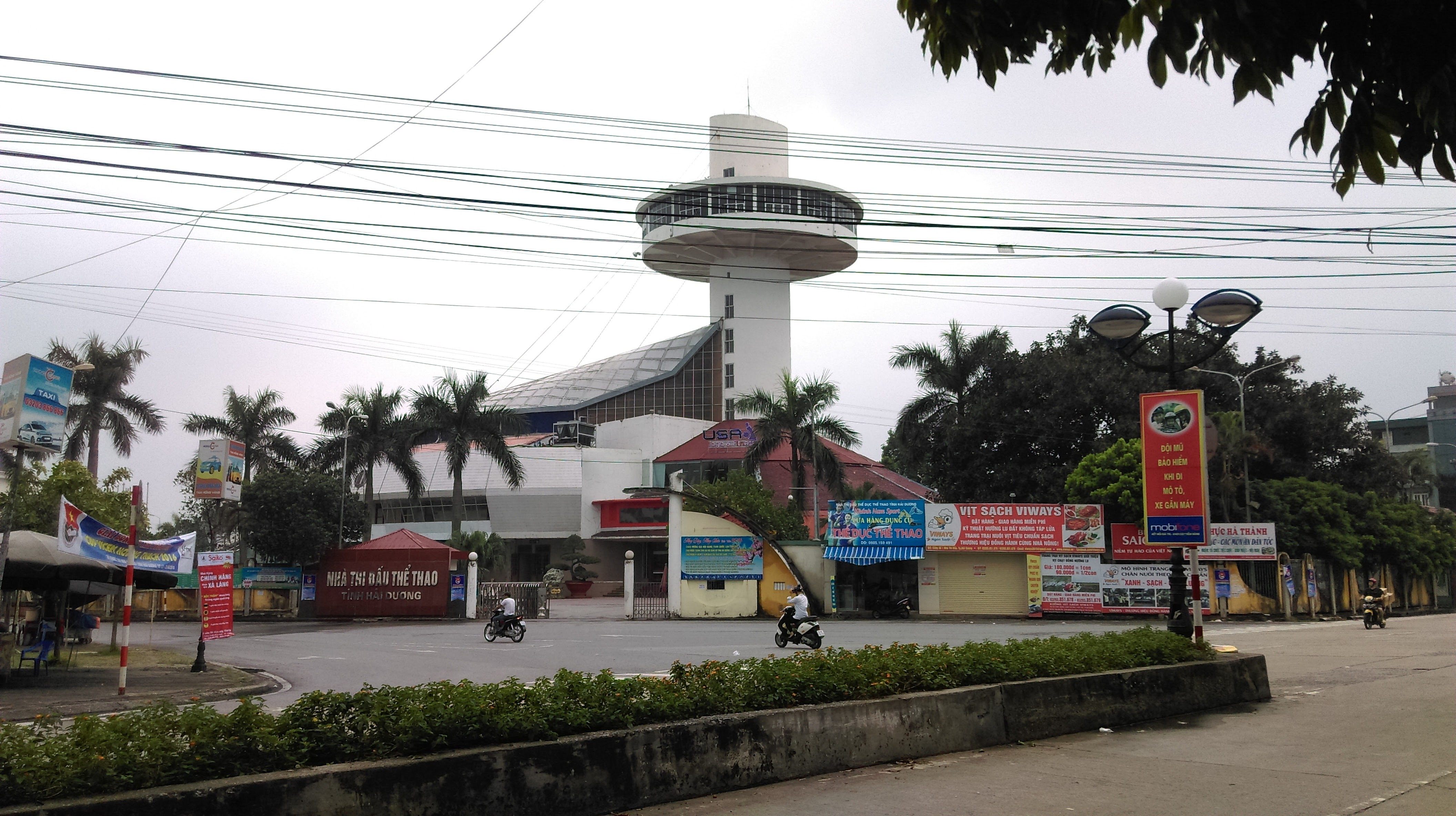 Nhà Thi đấu Thể thao tỉnh Hải Dương